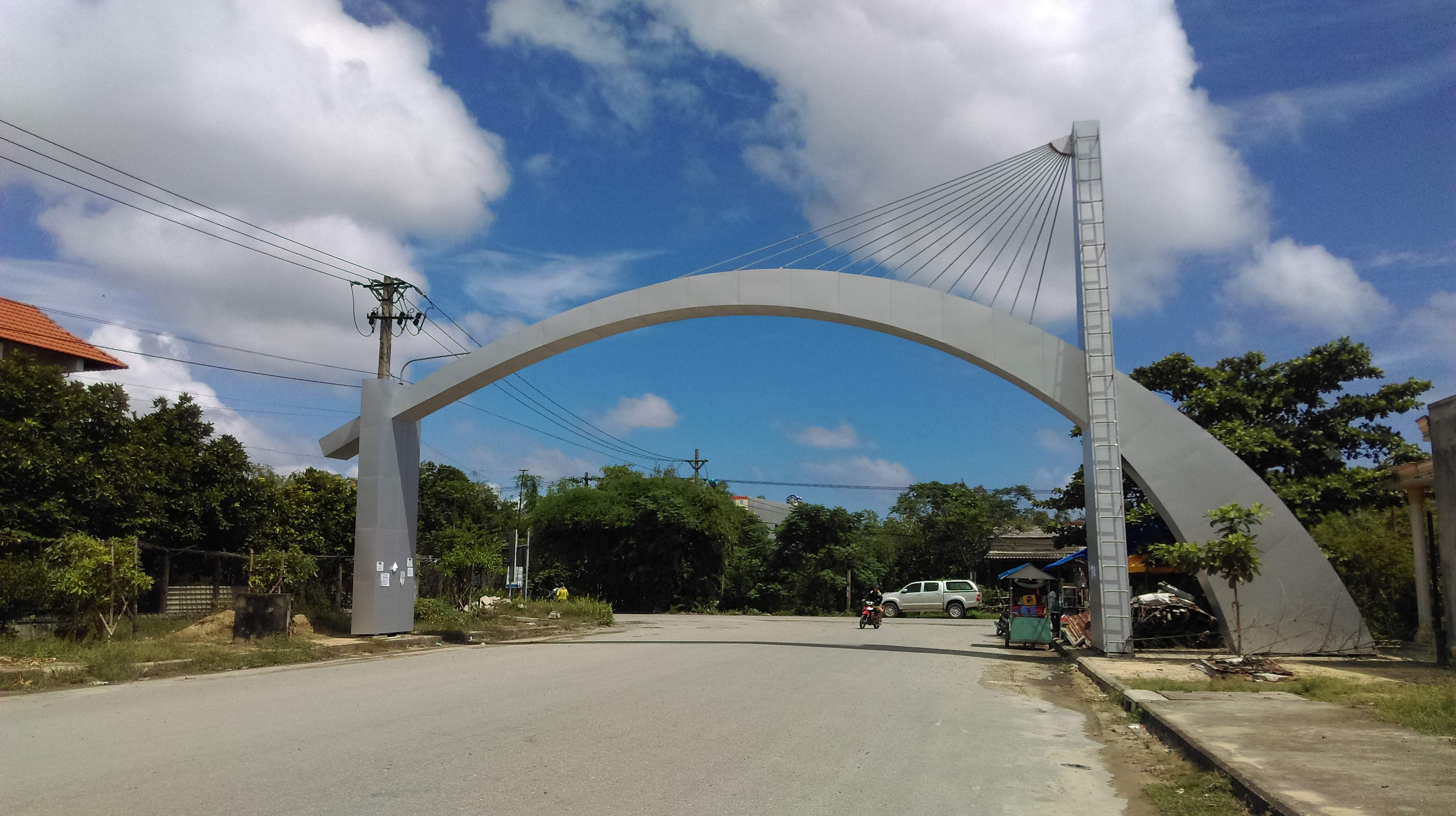 Cụm Công nghiệp An Lưu, Điện Nam Đông, Điện Bàn, Quảng Nam